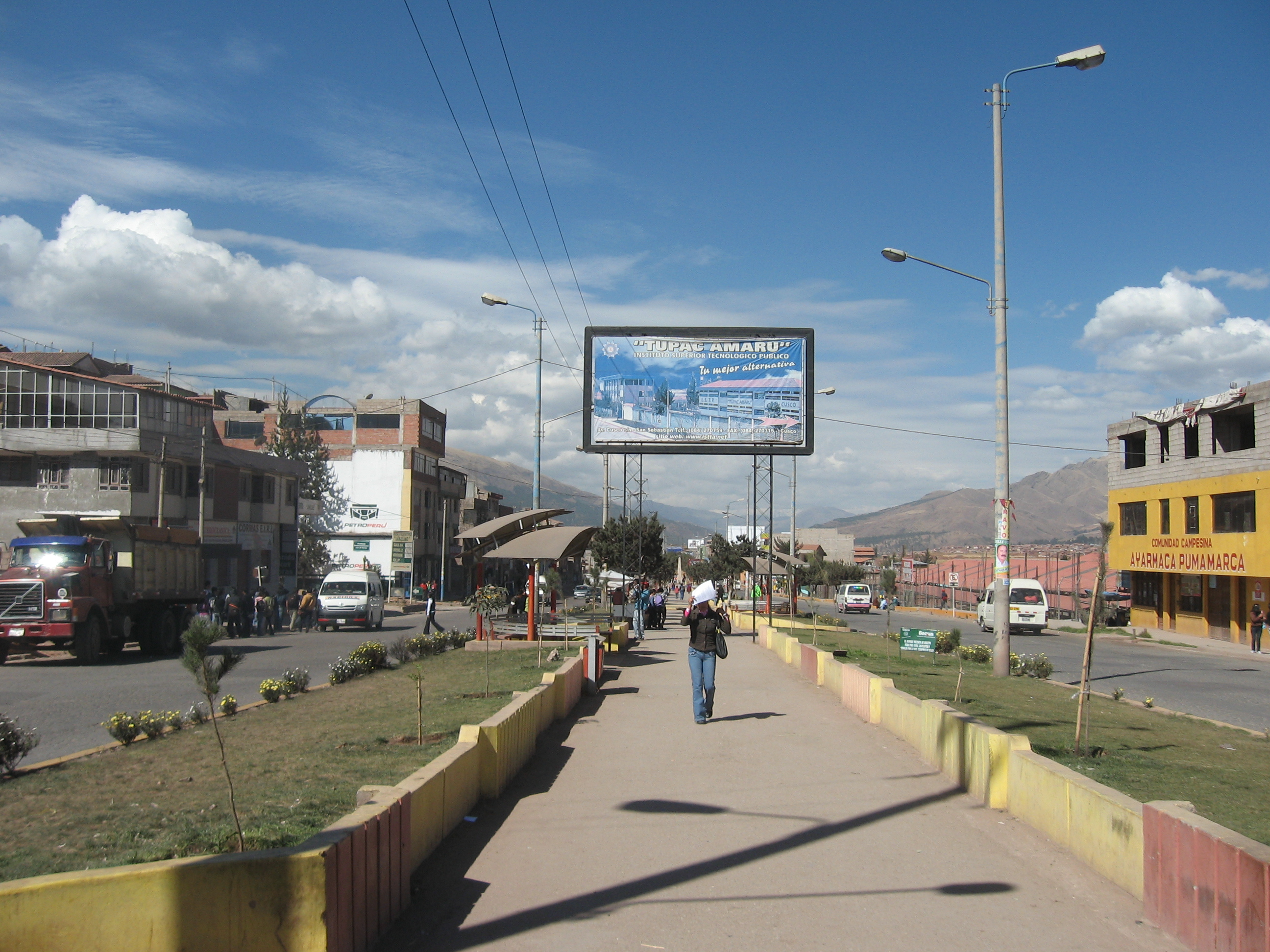 sexto paradero, san sebastian